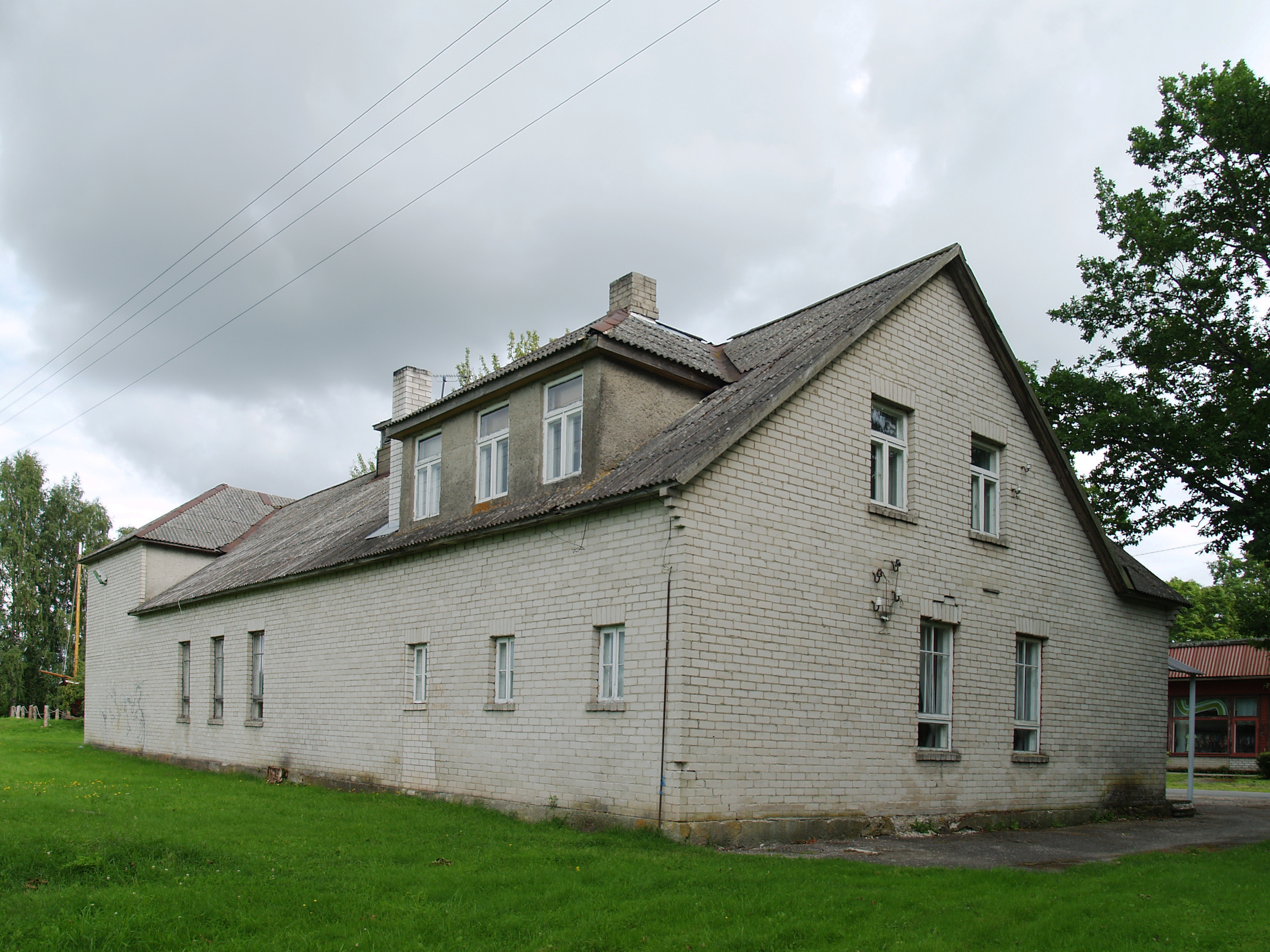 Kabli seltsimaja ja raamatukogu tagantkülg.